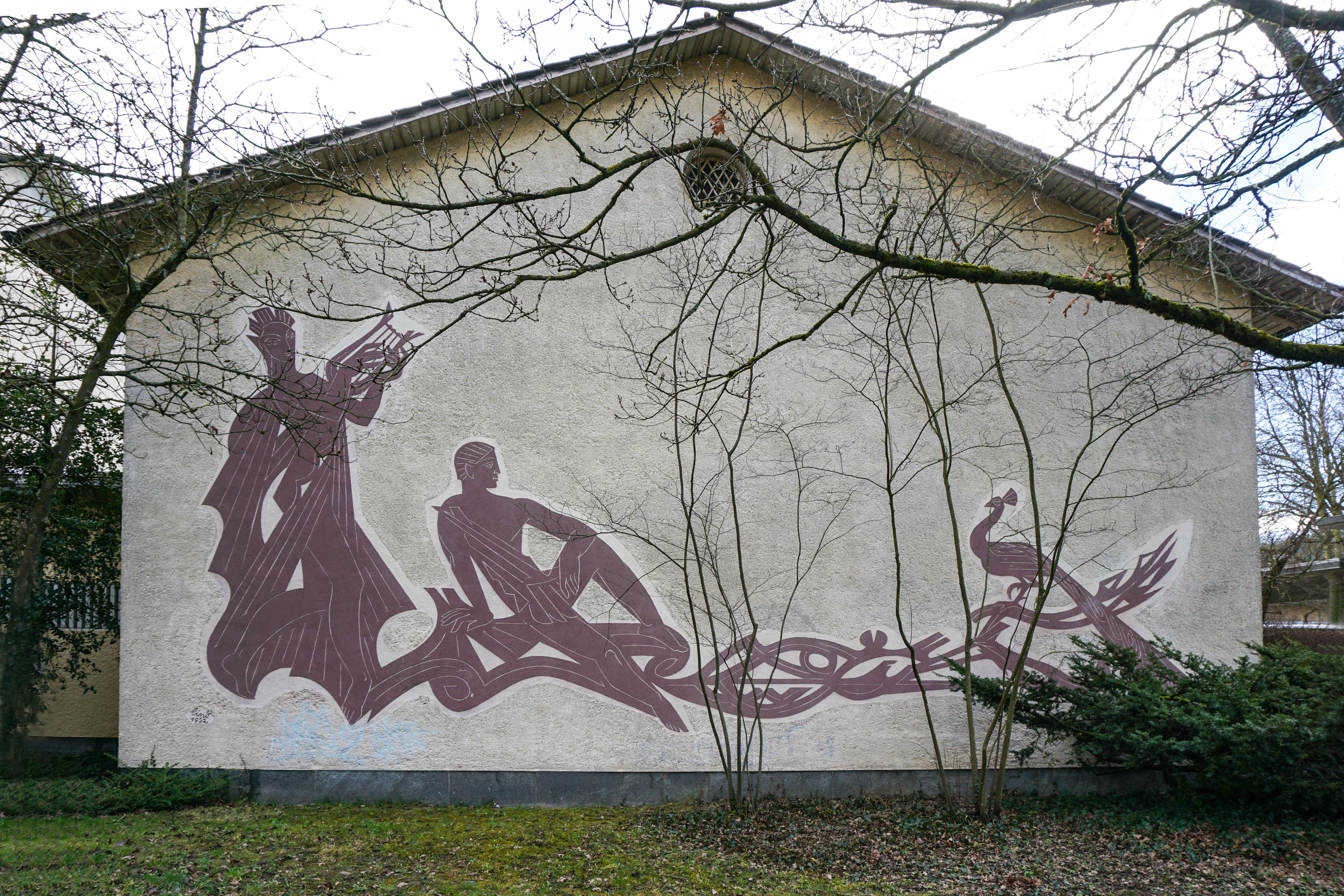 Wandbild von Albert Lindegger an Lehrerinnenseminar Marzili Bern 1952